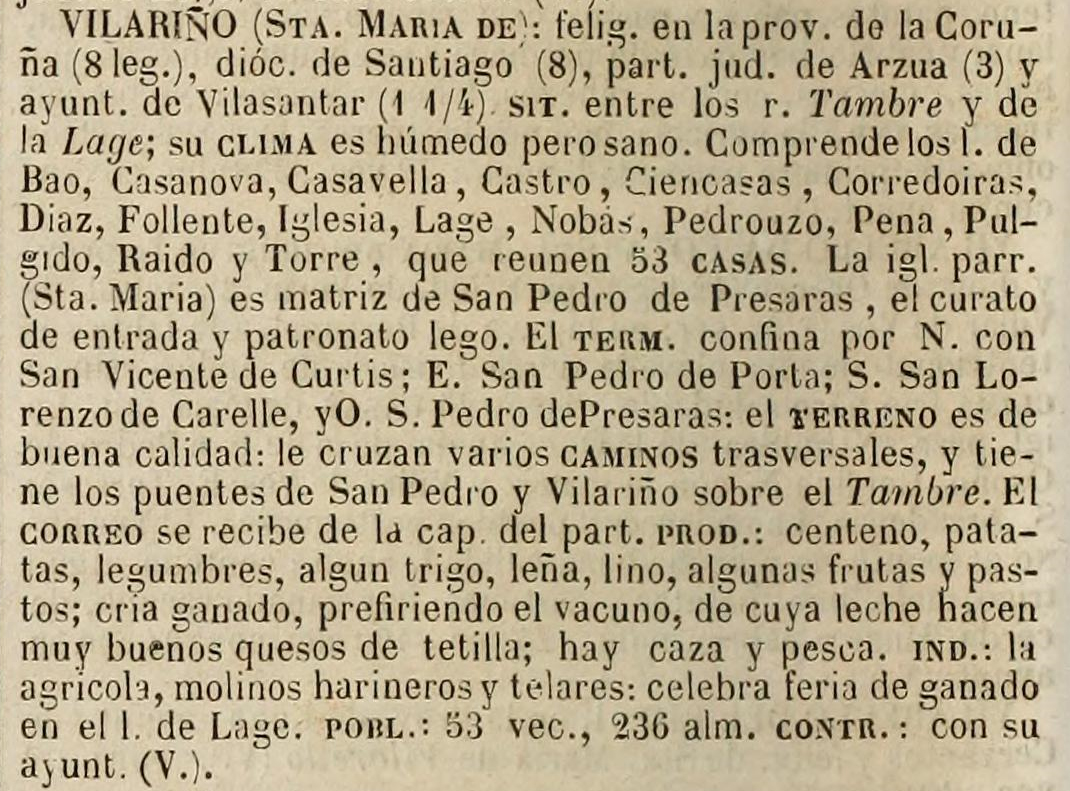 Vilariño no Diccionario geográfico-estadístico-histórico de España y sus posesiones de Ultramar.